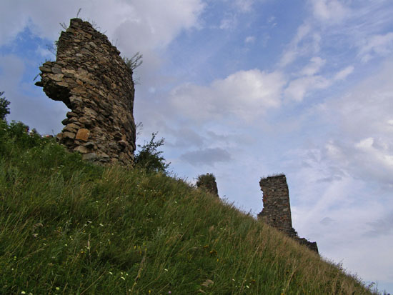 Губківський замок 2.jpg: Губківський замок